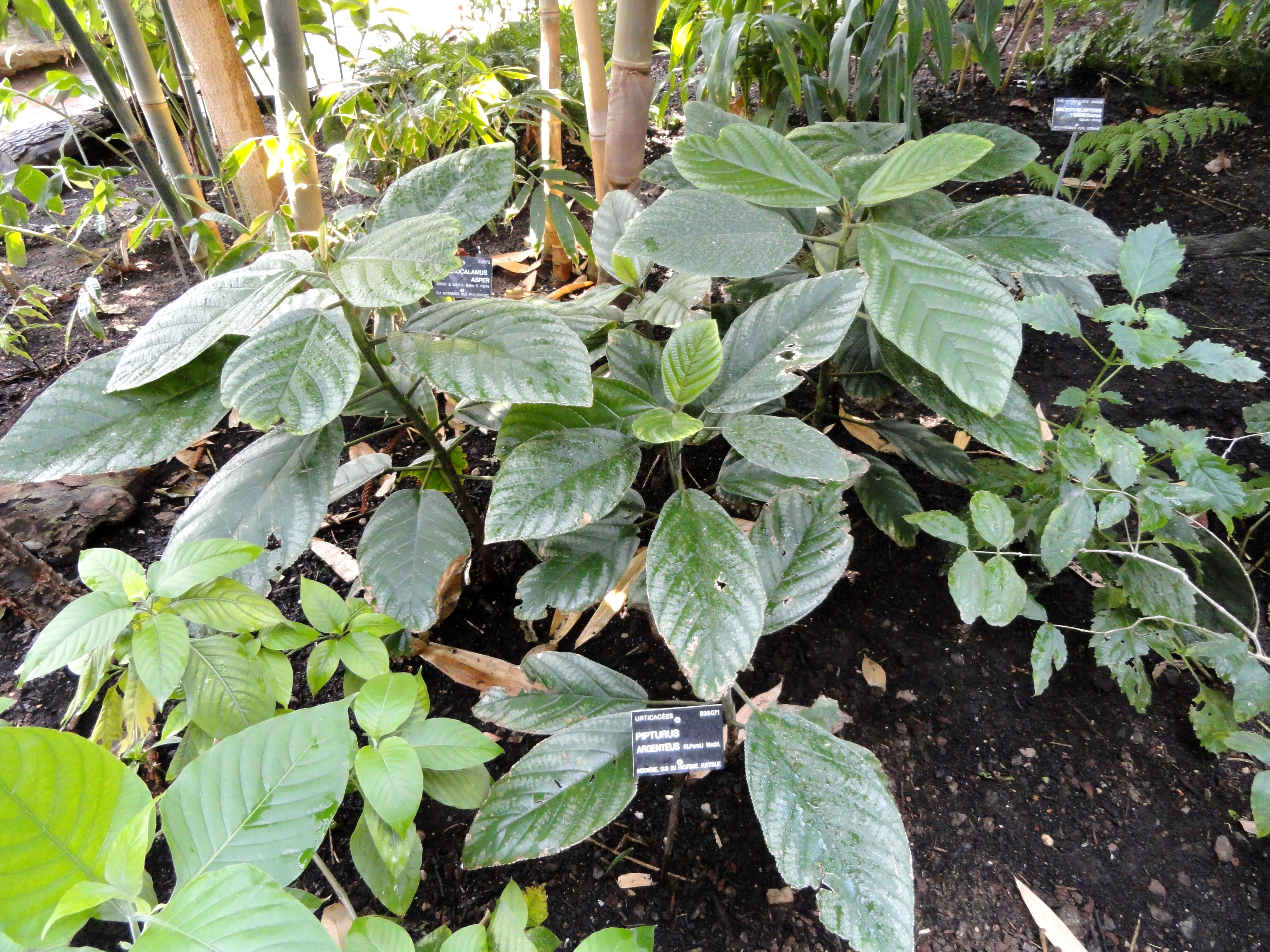 Pipturus argenteus specimen in the Jardin Botanique de Lyon, Parc de la Tête d'Or, Lyon, France.